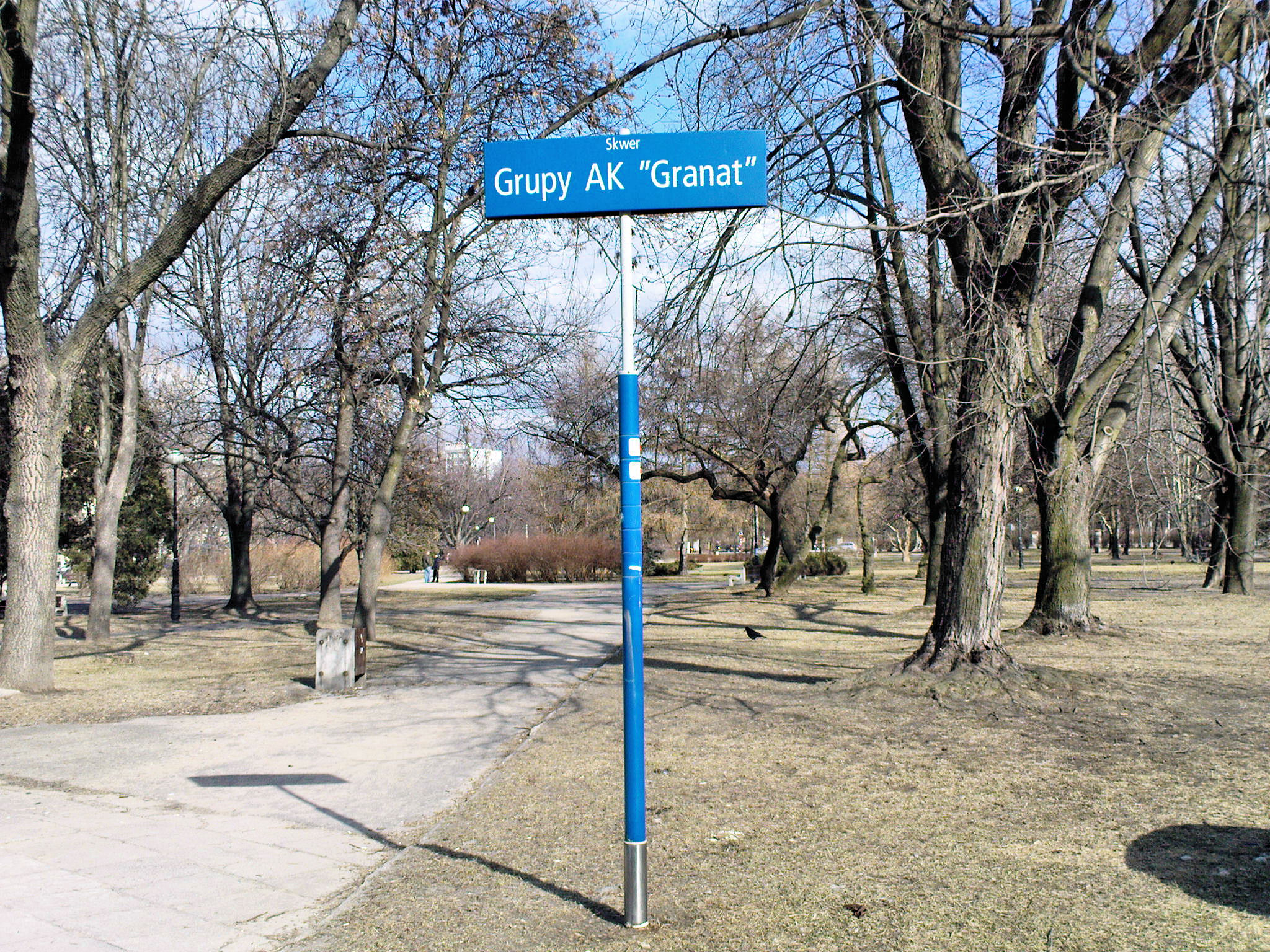 Skwer Grupy AK "Granat" - położony jest pomiędzy ulicami: Broniwoja od południa, Wielicką od zachodu, Woronicza od północy a ul Puławska od wschodu